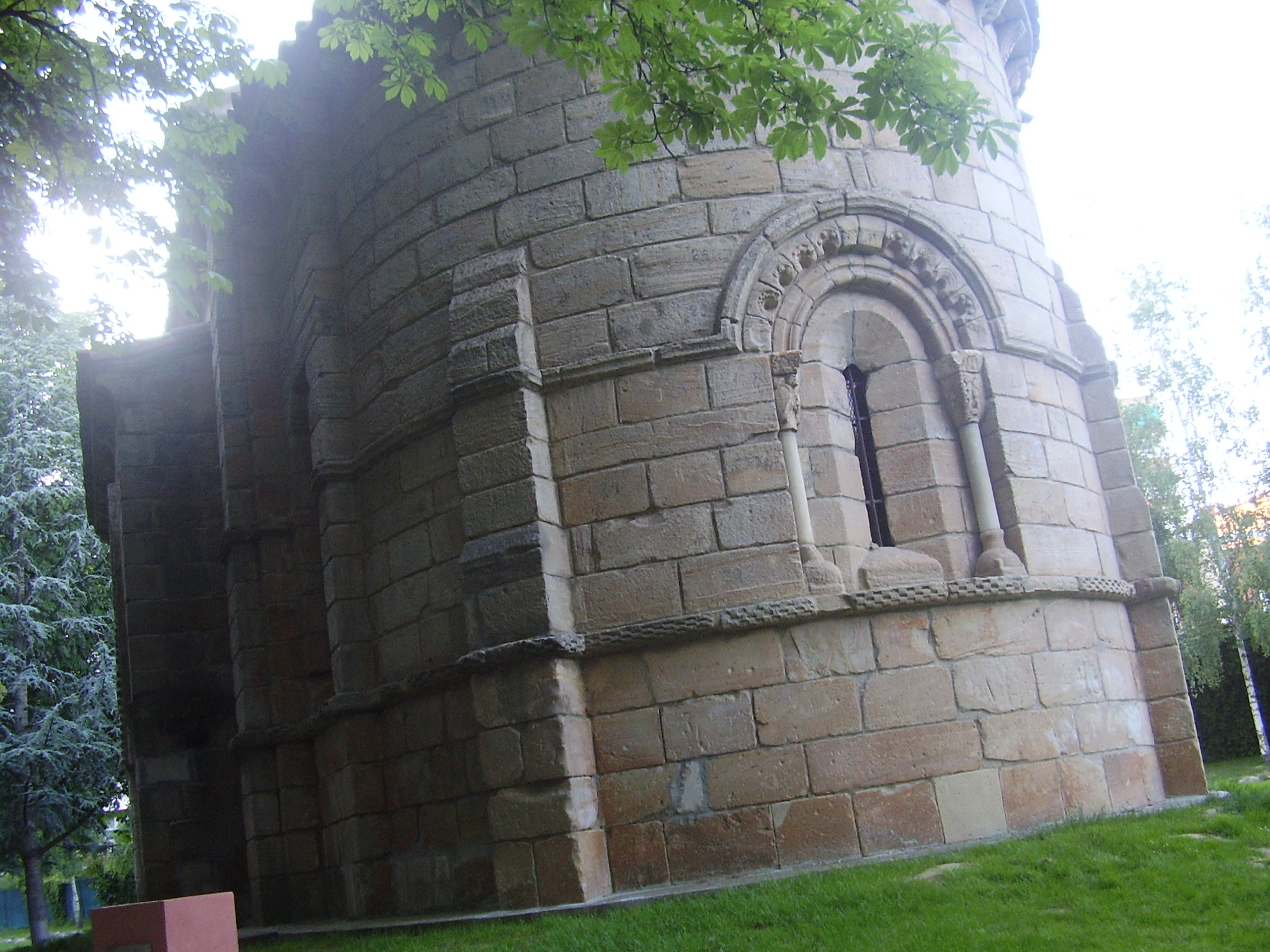 Ábside de la ermita románica de San Juan Bautista, de la desaparecida aldea de Villanueva del Río en la Huerta de Guadián, Palencia. Siglo XII